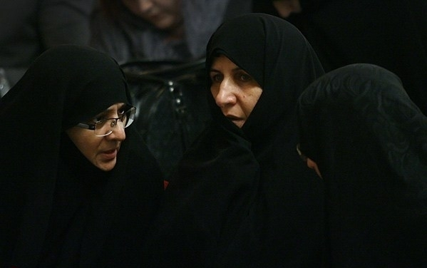 Azam-al-Sadat Frahi and Parvin Ahmadinejad